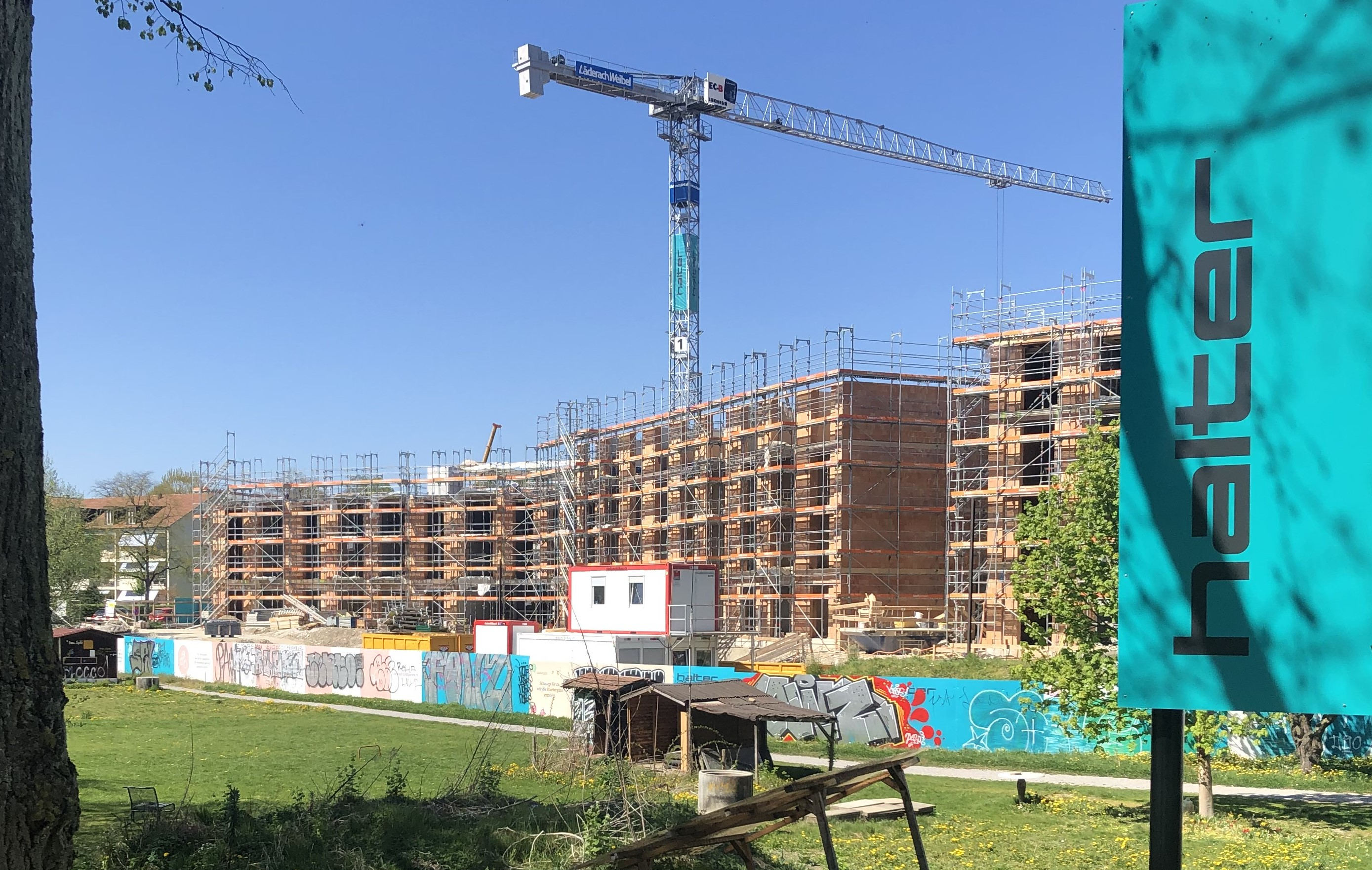 Neubaugebiet Huebergass